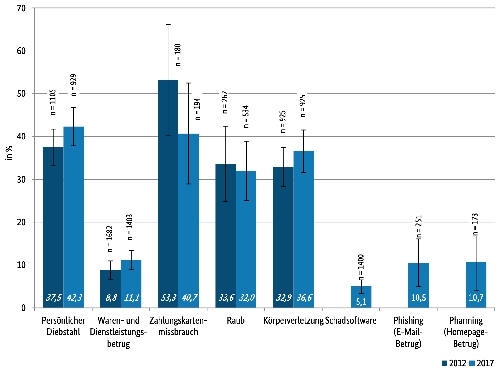 Anzeigequoten für personenbezogene Opfererlebnisse innerhalb der letzten zwölf Monate (2017) in der Bundesrepublik Deutschland